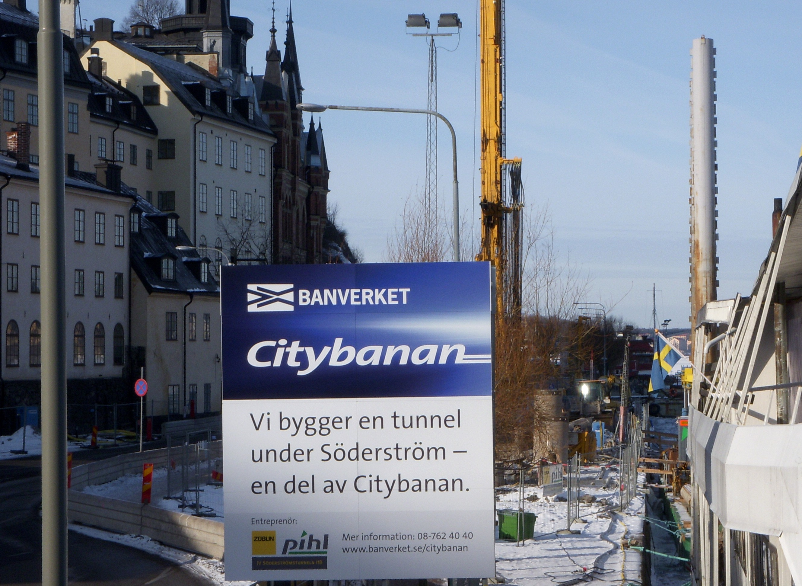 Byggnadsarbeten för "Citybanan" i Stockholm, mars 2009